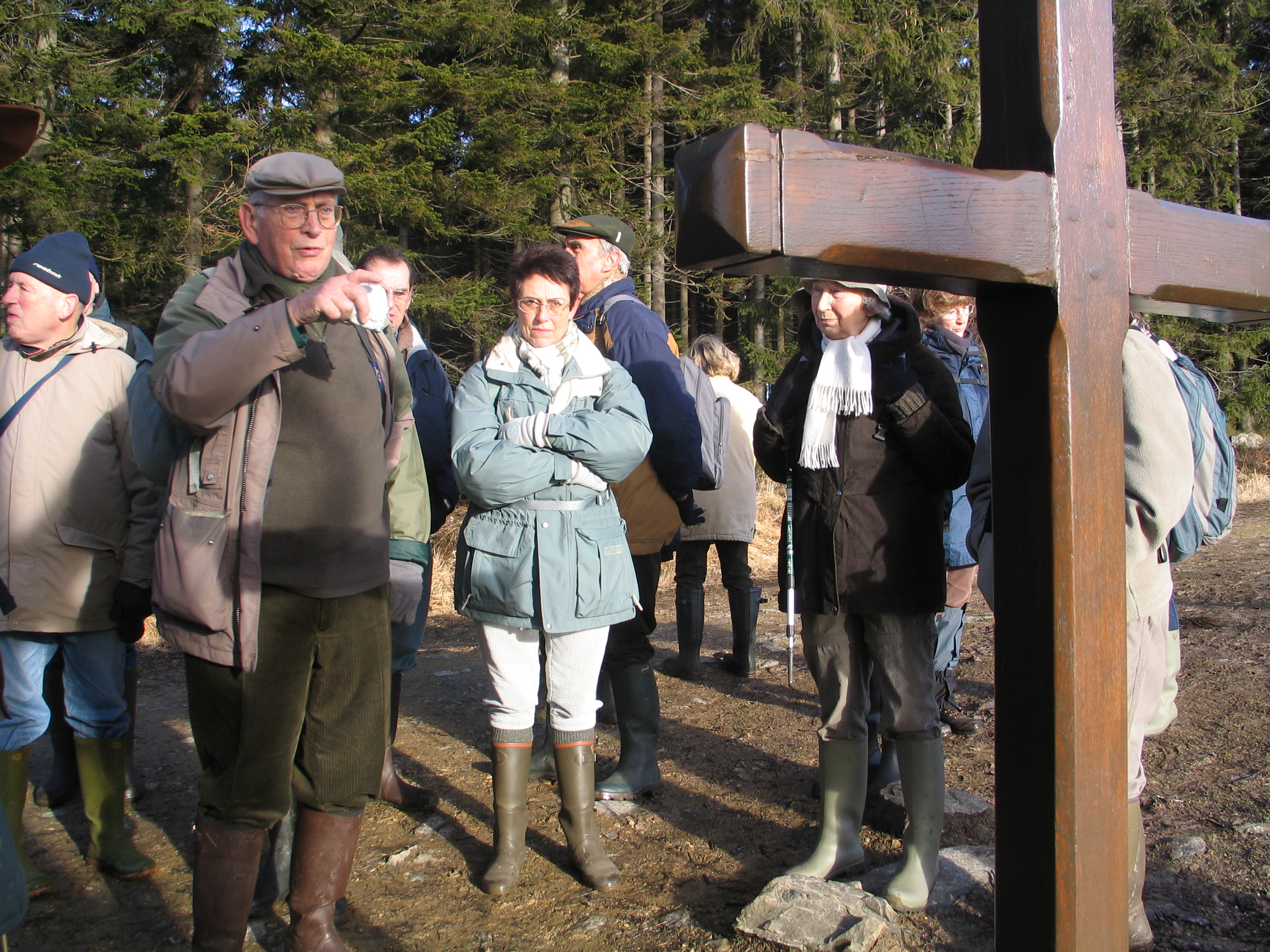 Groupe des «Amis de la Fagne» à la Croix des Fiancés sous la conduite de V. Bronowski.